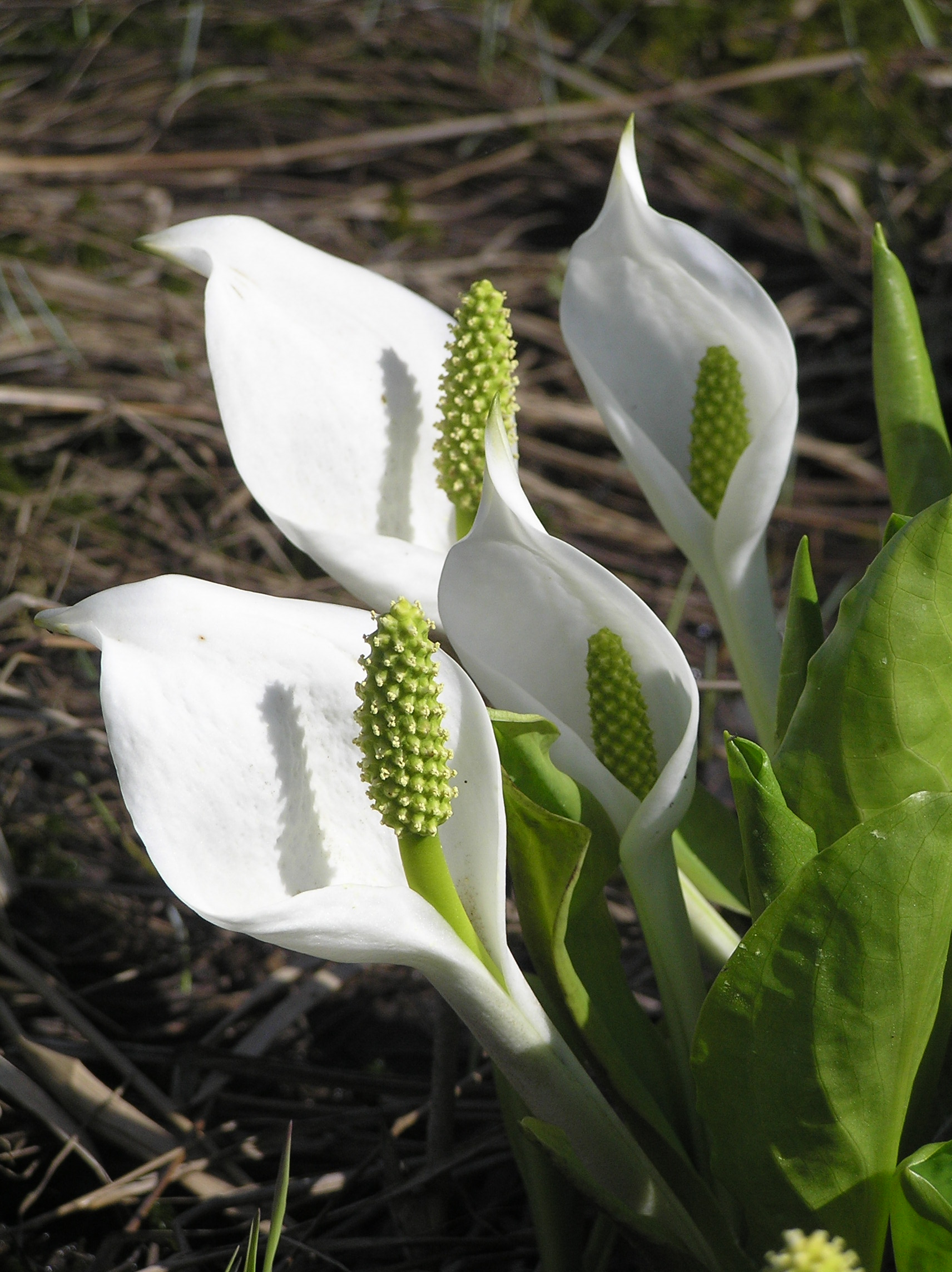 北海道雨竜沼